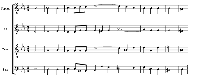 Takt 46ff des Hostias im Mozart-Requiem, Chorstimmen